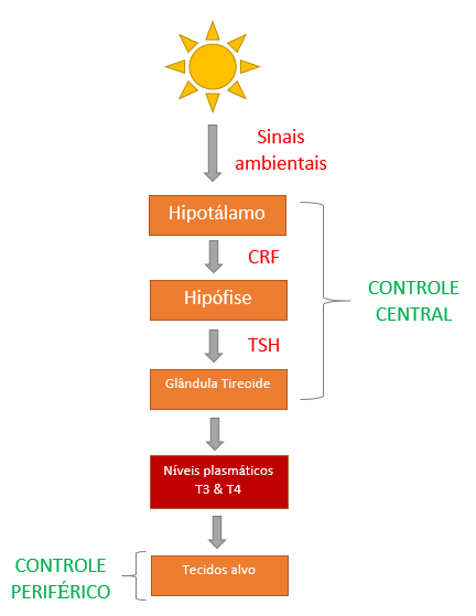 Esquema do controle hormonal de metamorfose em anfíbios